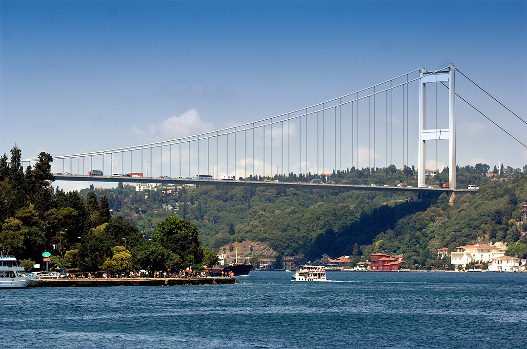 Sultan Mehmet Bridge